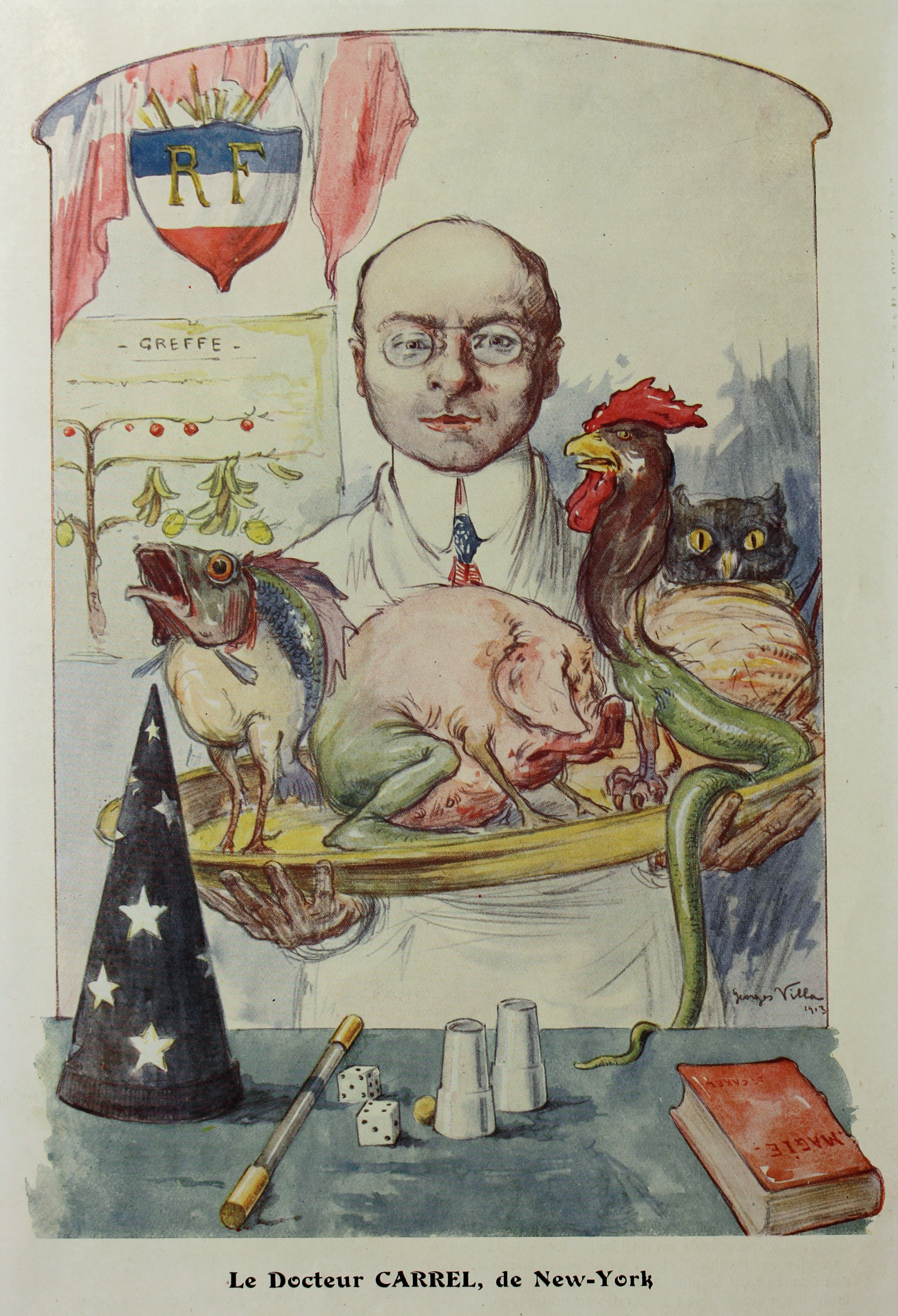 Caricature de Georges Villa 1913 réalisée en référence au séjour du docteur Carrel à New York, propriété Hospices civils de Lyon